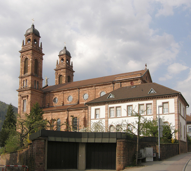 Eberbach